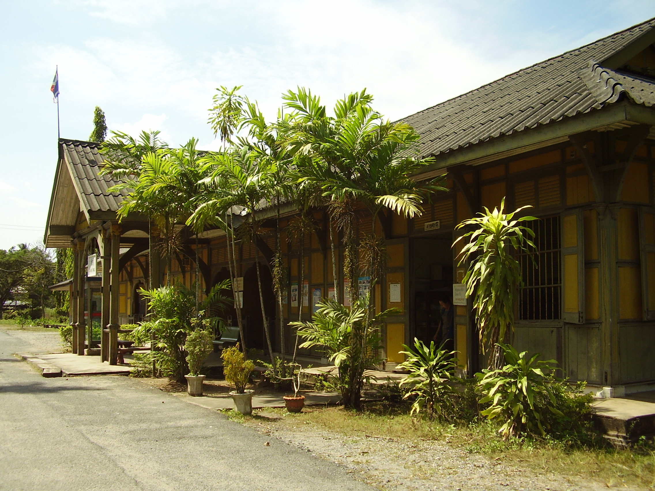 Kantang railway station